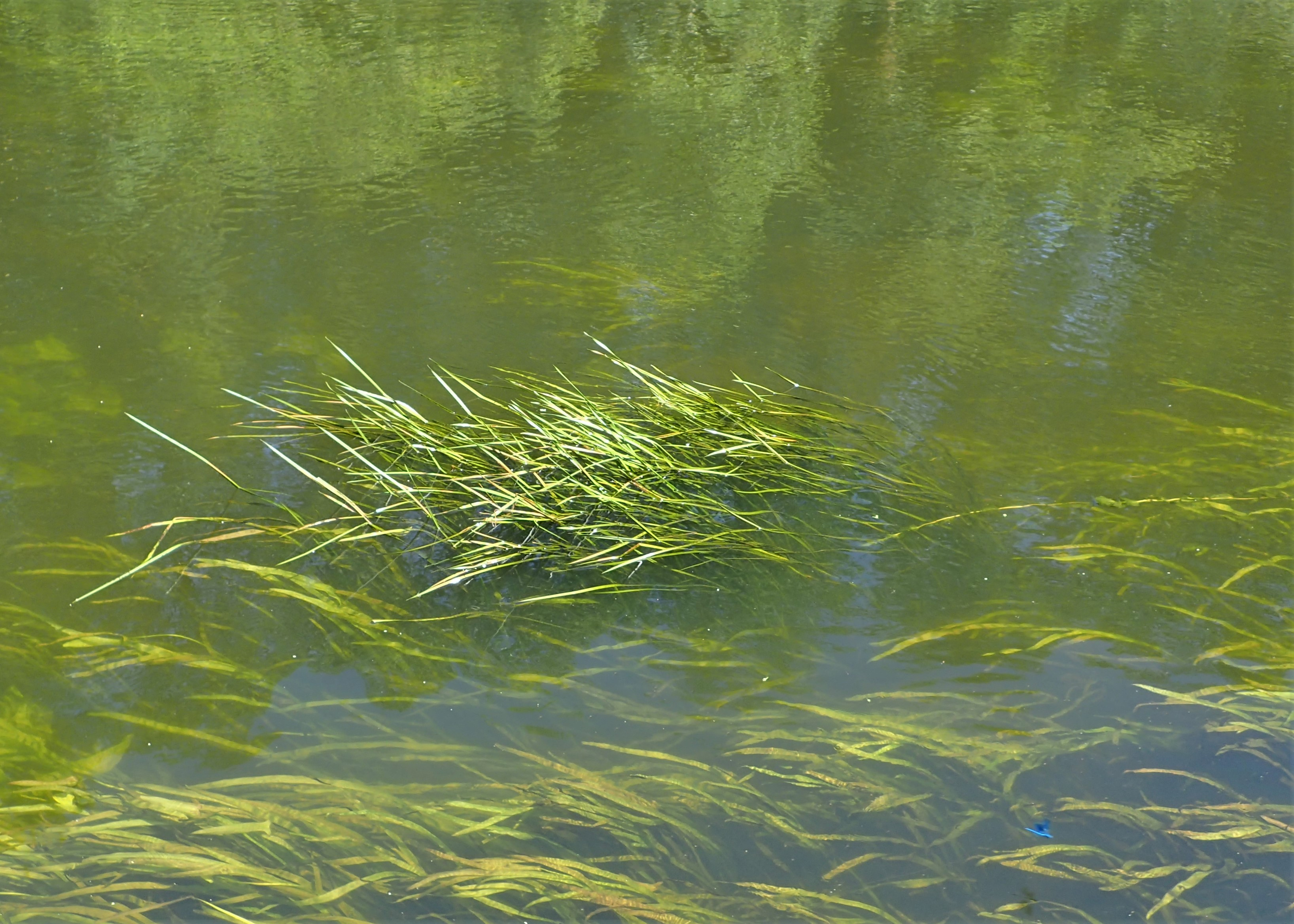 Butomus umbellatus in river Rega, near Gryfice, NW Poland